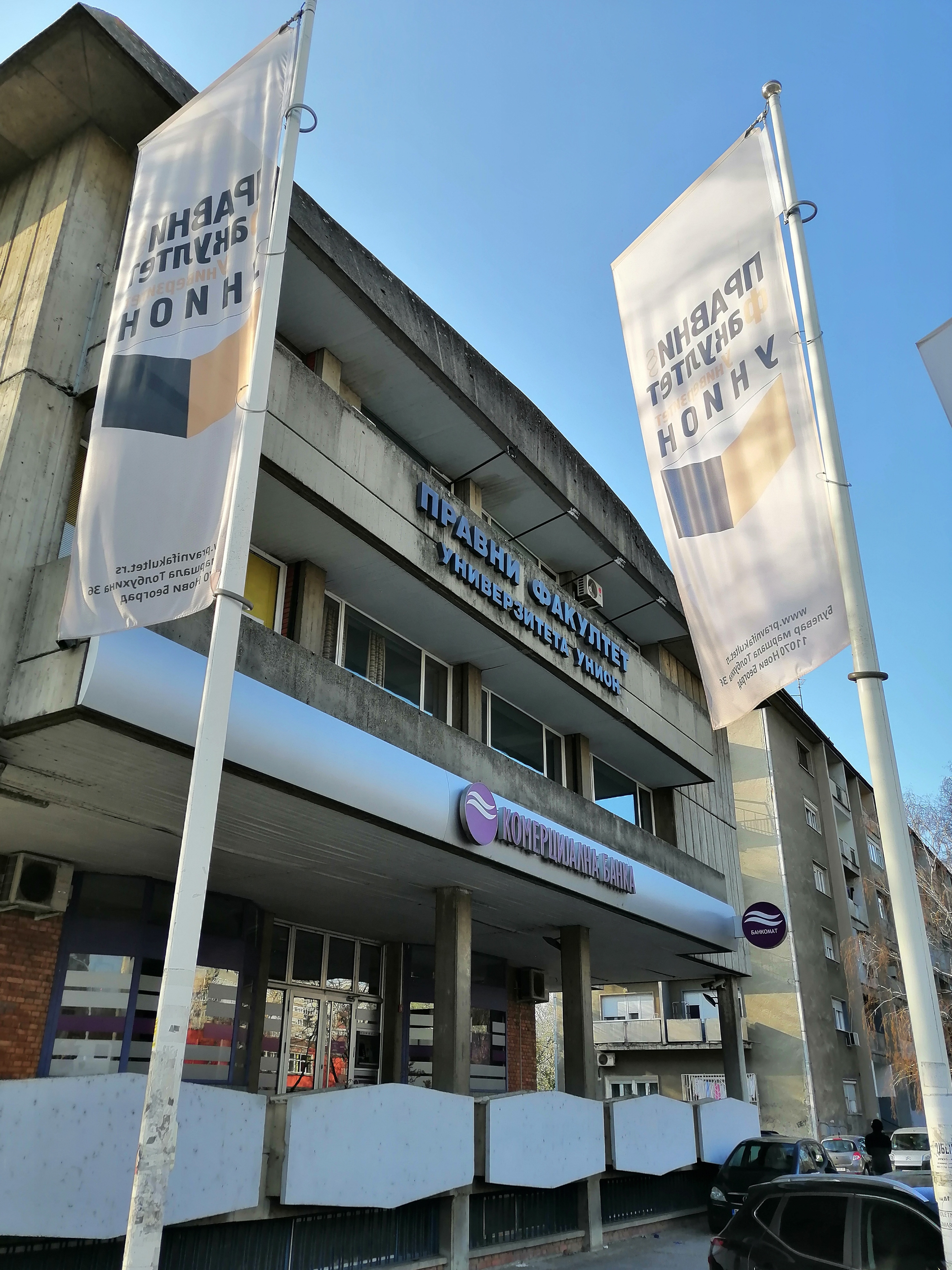 Srpski (latinica): Pravni fakultet Univerziteta Union